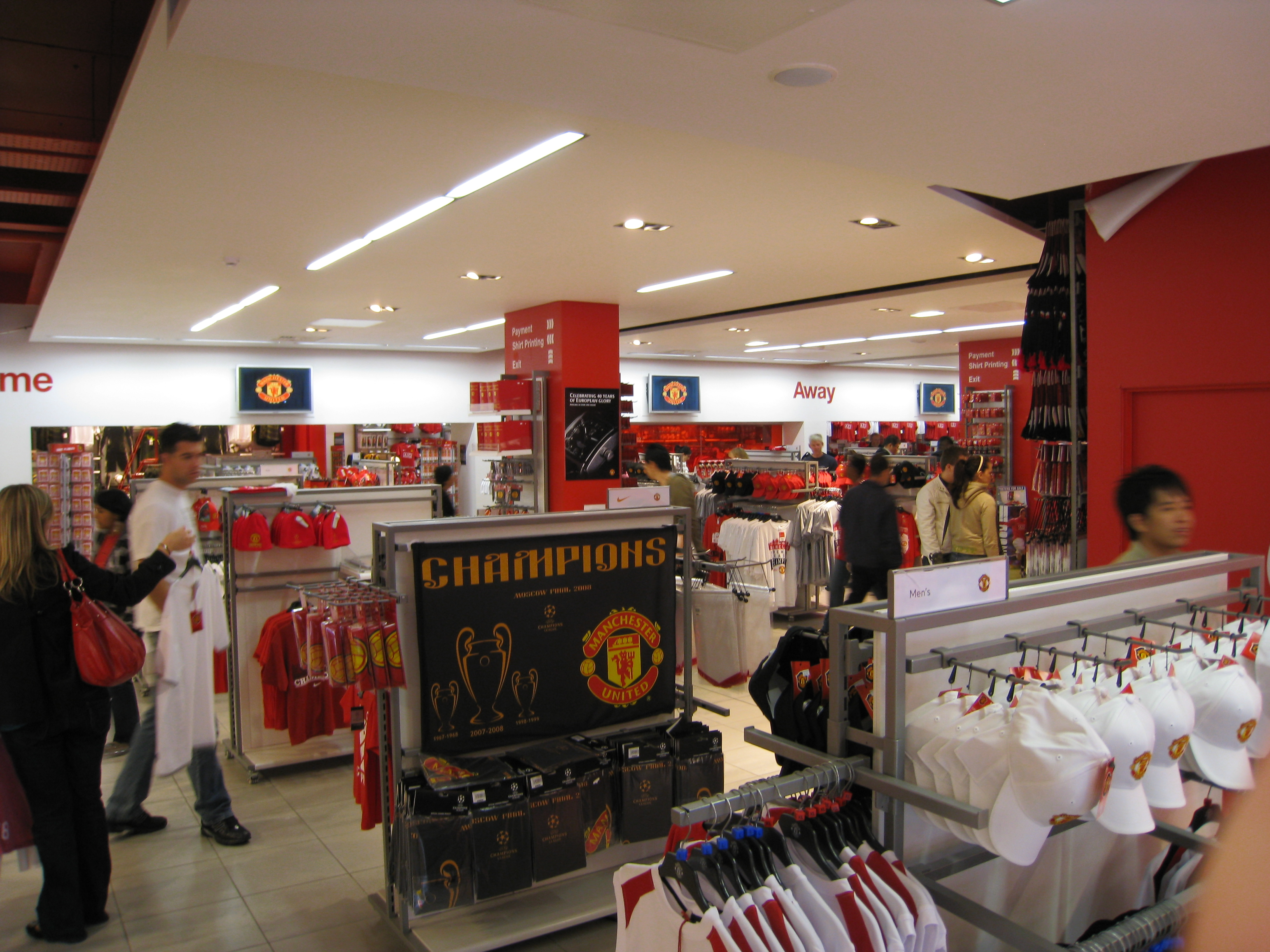 mégastore de Old Trafford